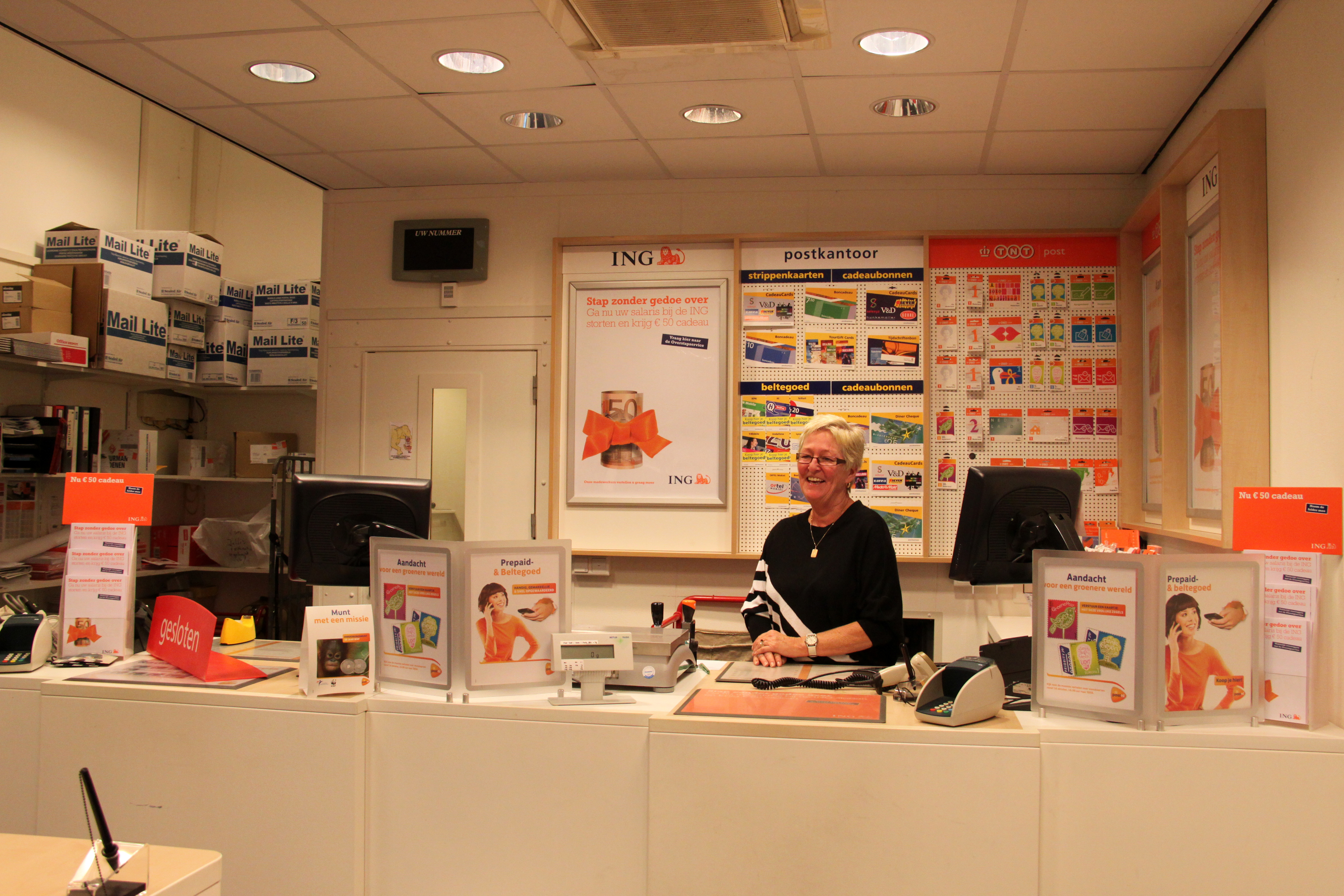 Balie van een klein postkantoor in Den Burg, Texel.